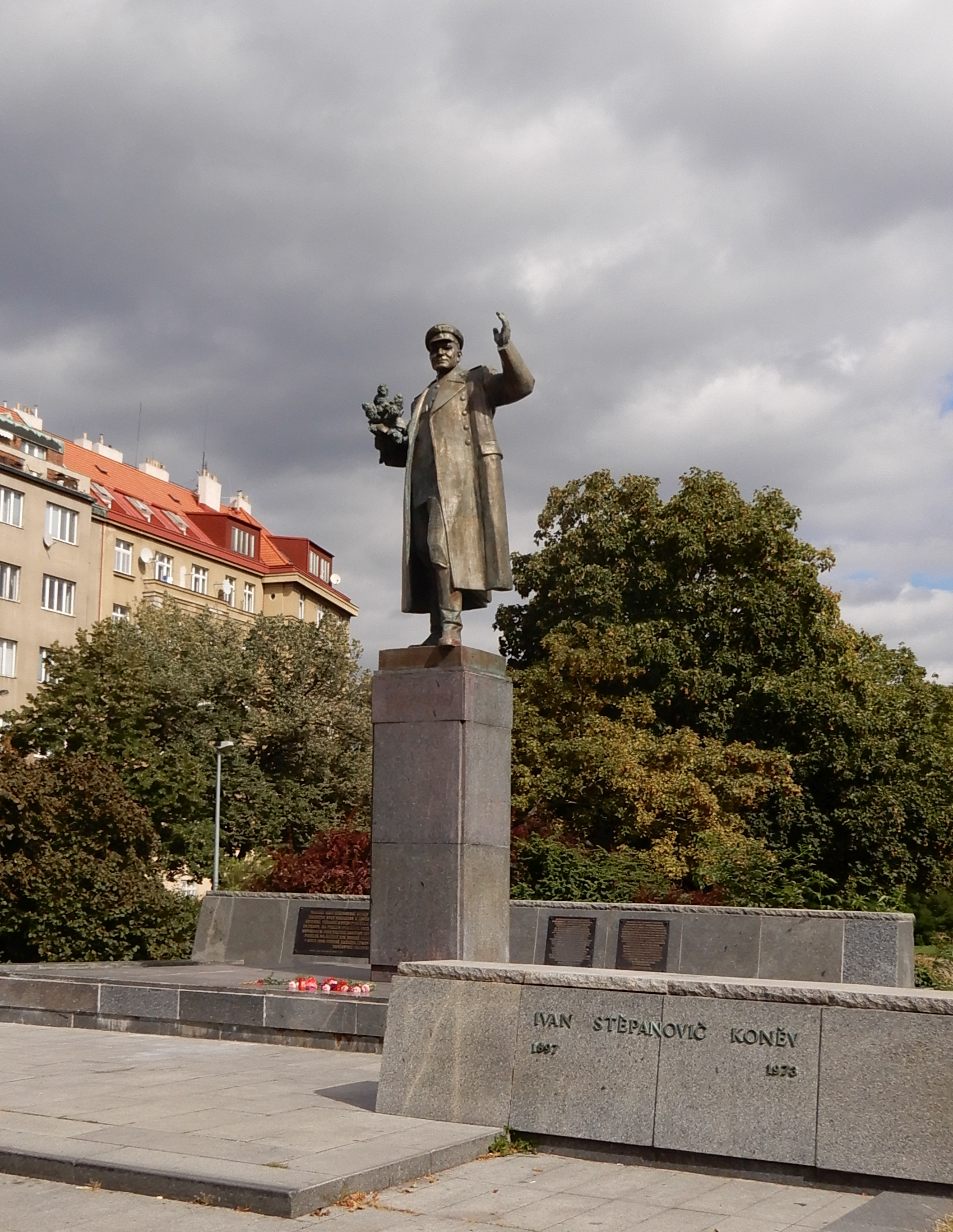 Zdeněk Krybus, Pomník sovětského maršála Ivana Stěpanoviče Koněva v Praze 6 - Bubenči, náměstí Interbrigády, bronz 1980